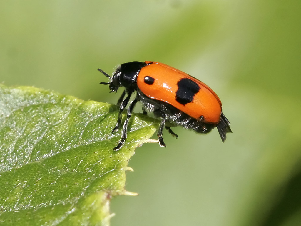 ein Ameisen-Sackkäfer (Clytra laeviuscula) in Bensheim (Hessen)